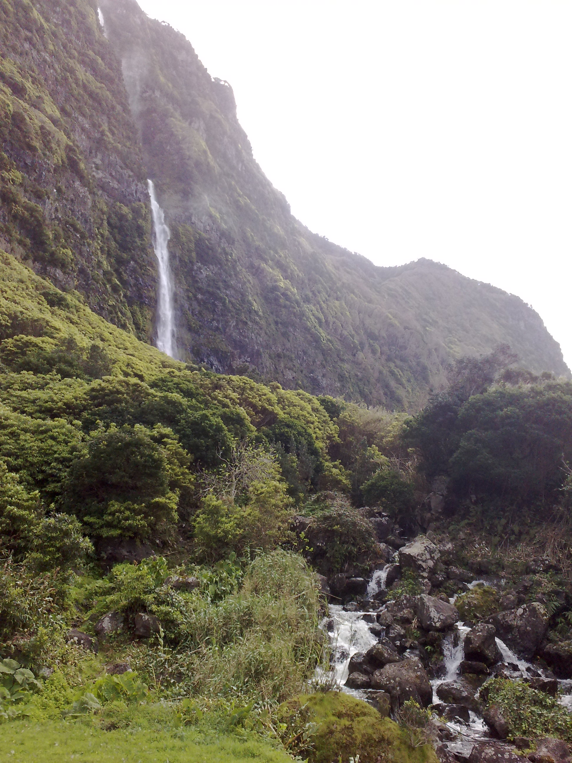 Waterfall, Ponta da Fajã, Flores, Azores